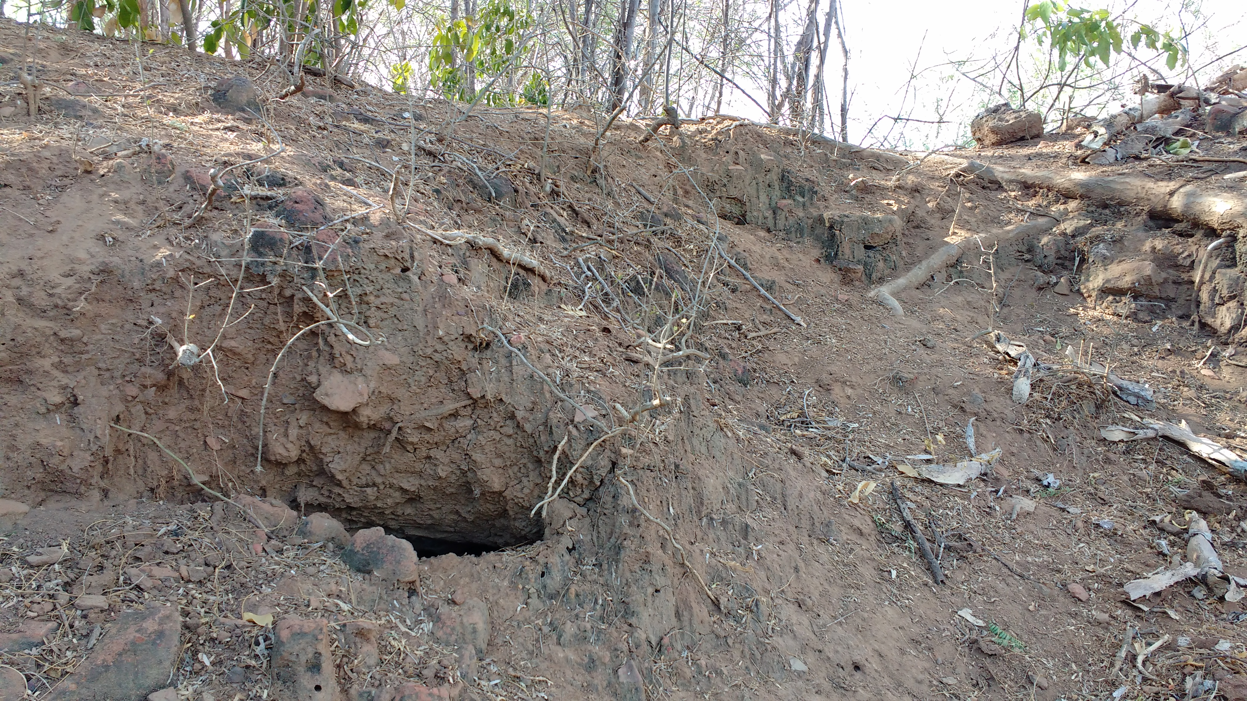 பொற்பனைக்கோட்டைக்குள் சுரங்கம் இருப்பதாக சொல்லப்படும் பகுதி